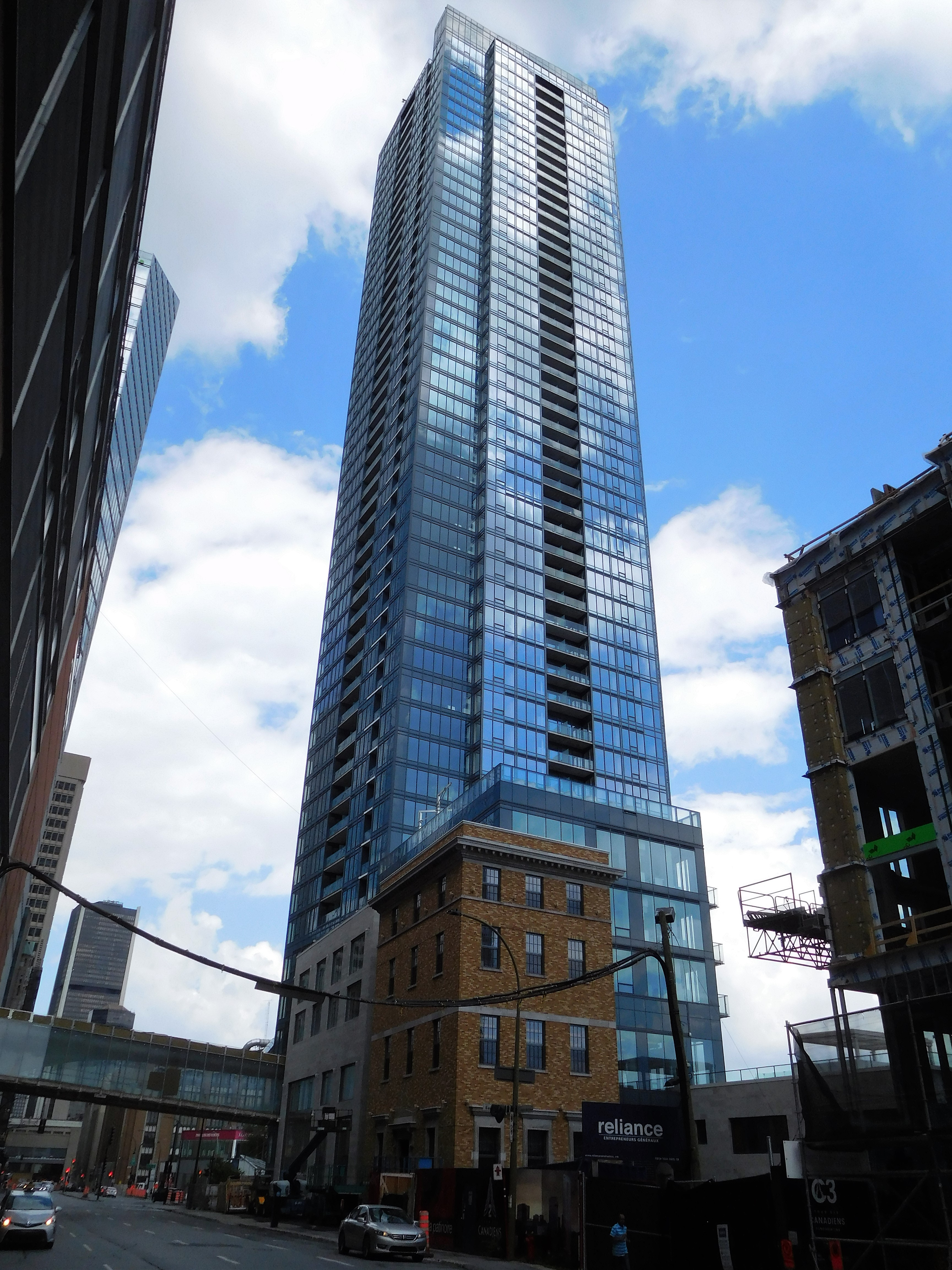 Tour des Canadiens 2, au 1188, rue Saint-Antoine Ouest, Montréal